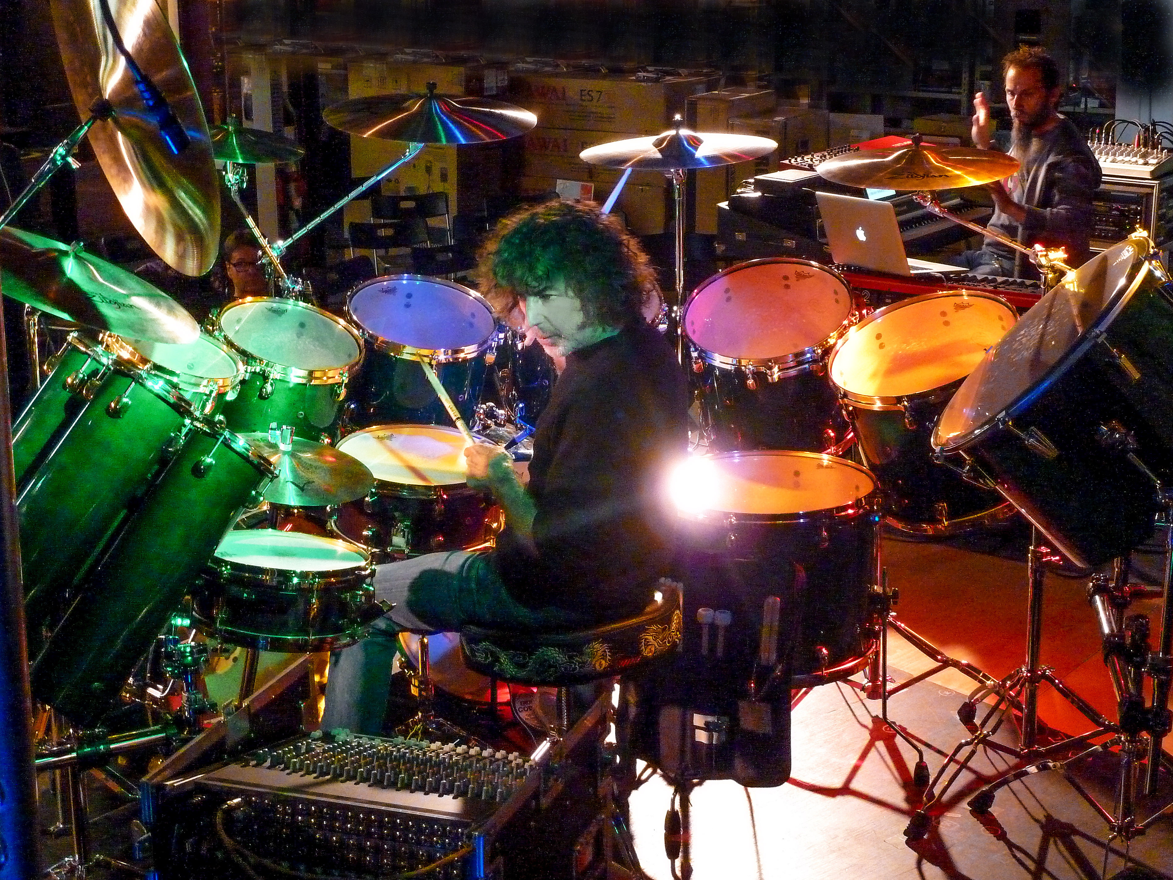 Simon Phillips (dr) und Steve Weingart (key) Masterclass clinic MP Schweiz